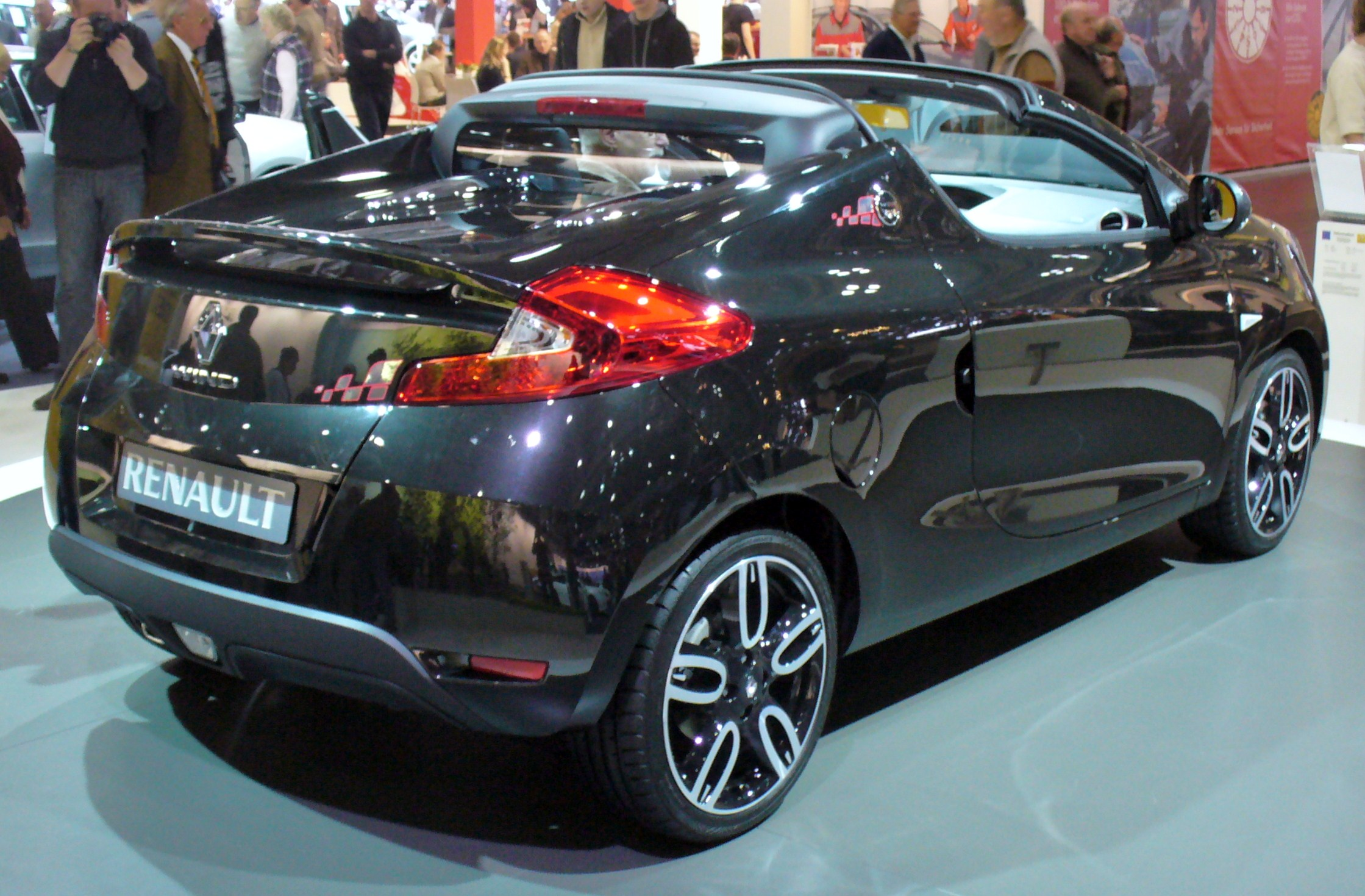 Renault Wind